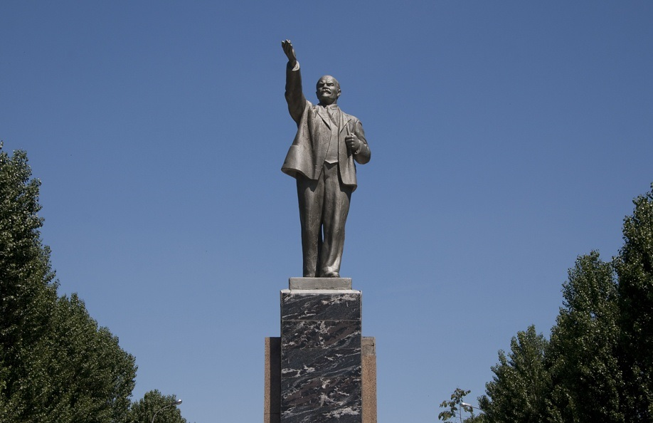 Памятник Ленину в Центральном парке Тольятти